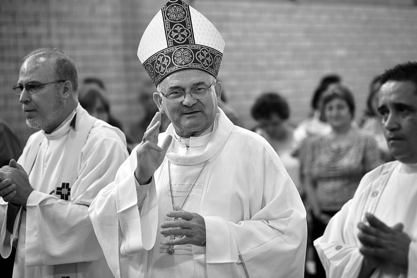 Bishop Canísio Klaus, of the Diocese of Santa Cruz do Sul